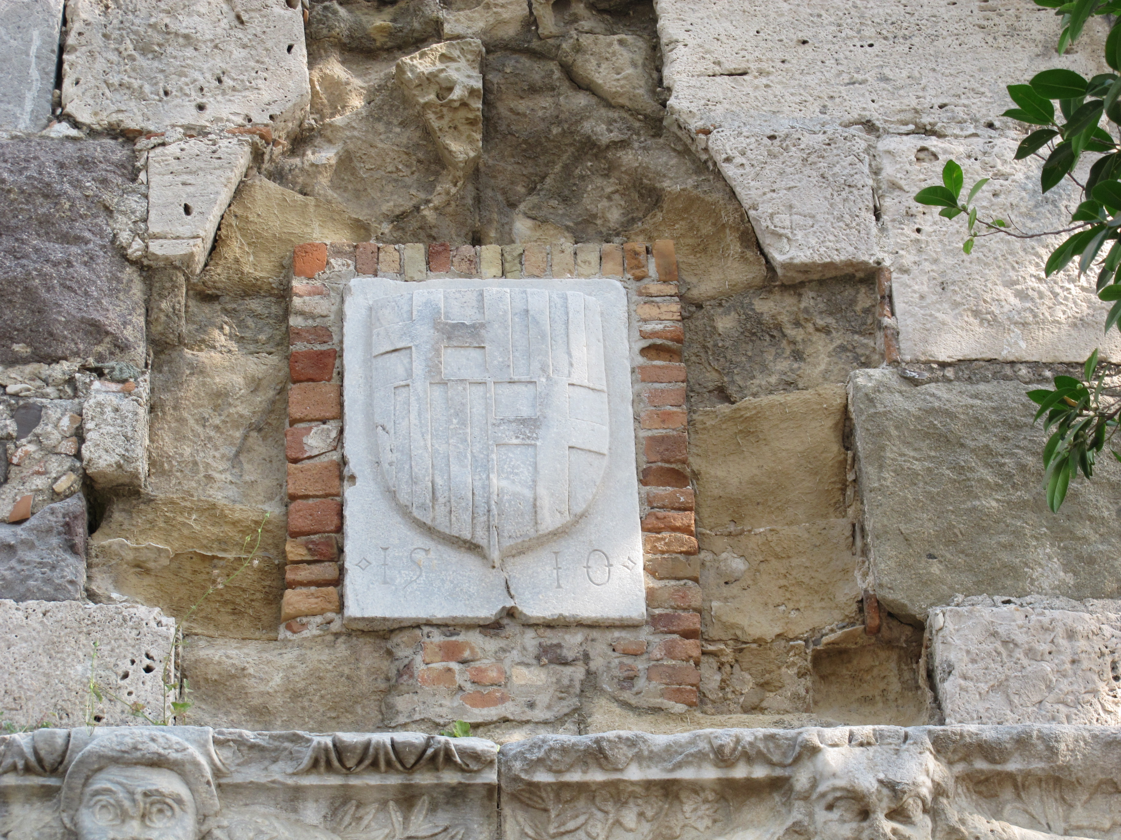 Castello di kos, cavalcavia d'accesso 03 stemma cavalieri emery d'amboise, 1510